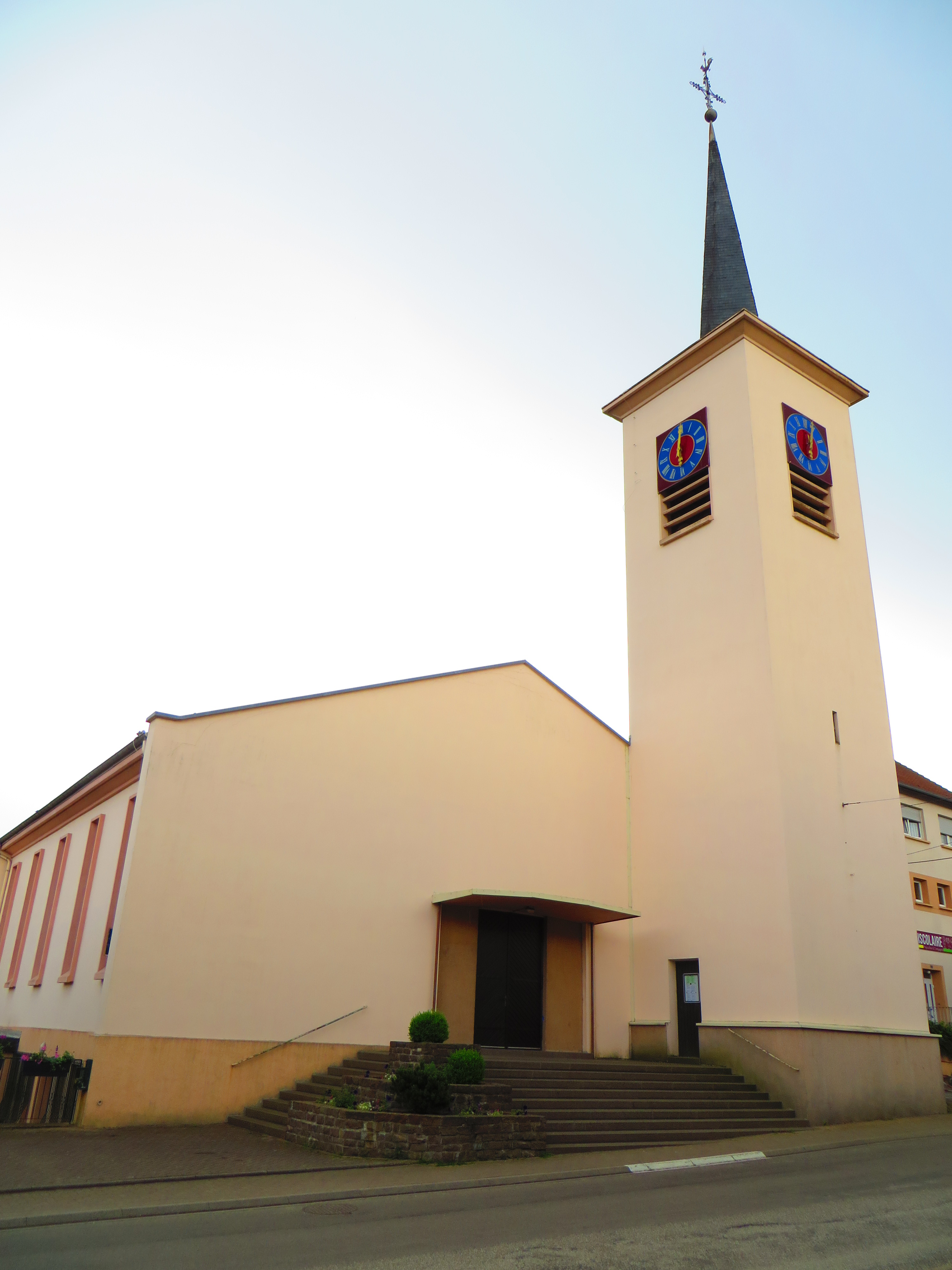 Lixing-lès-Rouhling Église Saint-Maurice